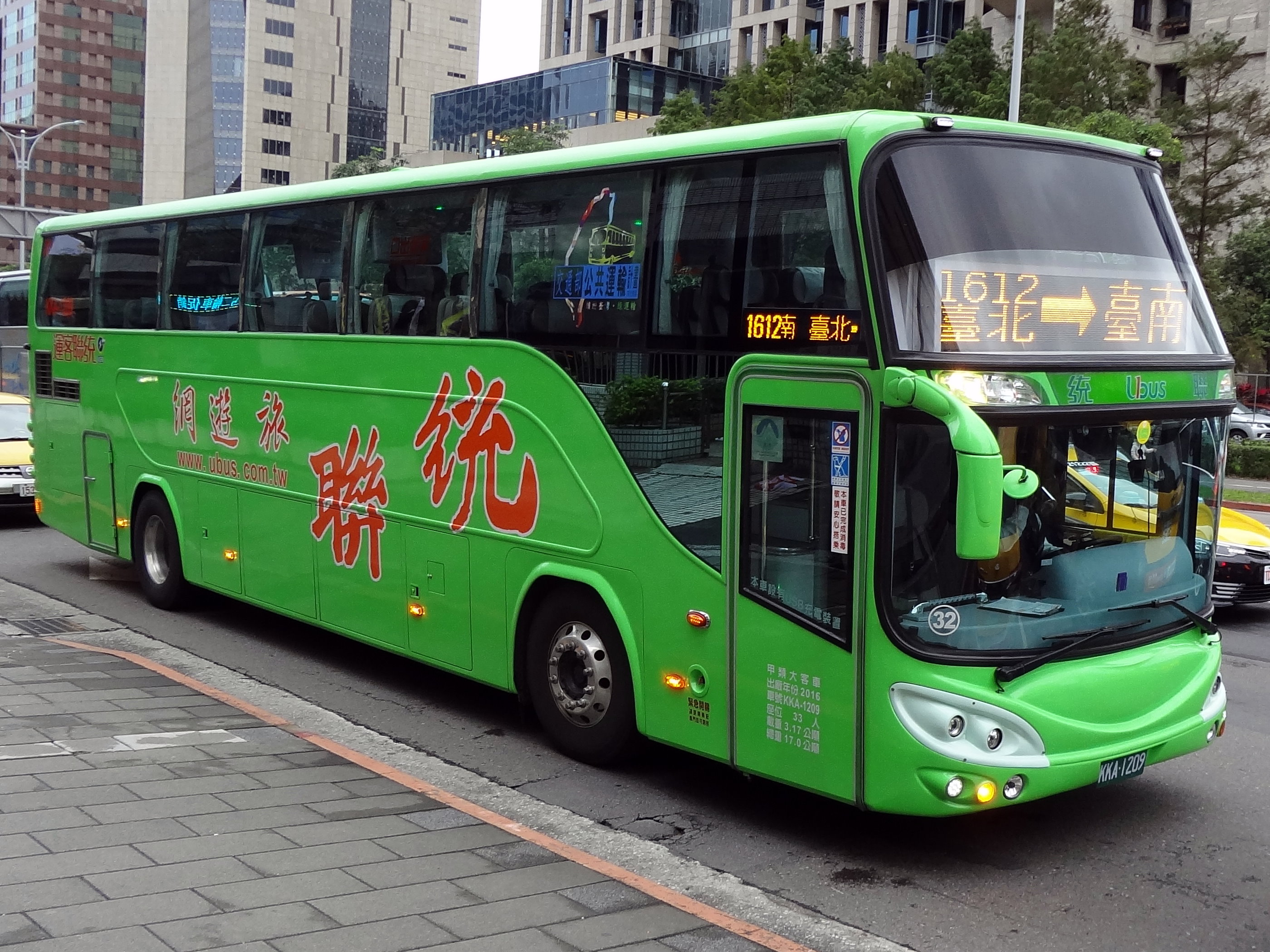 統聯客運2016年大客車KKA-1209右前方外觀。